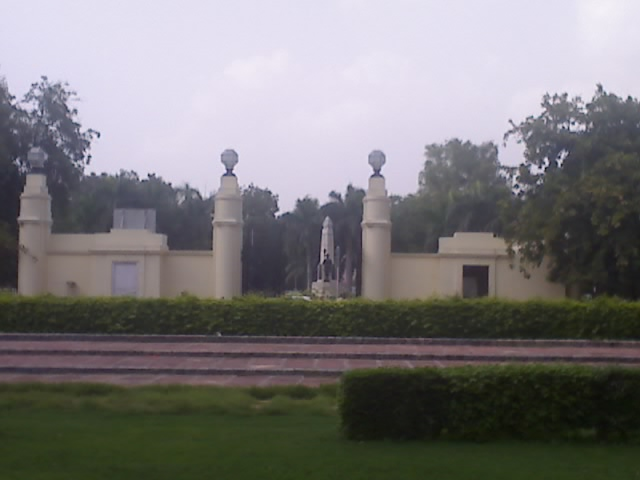 तीन मूर्ति भवन का मुख्य द्वार